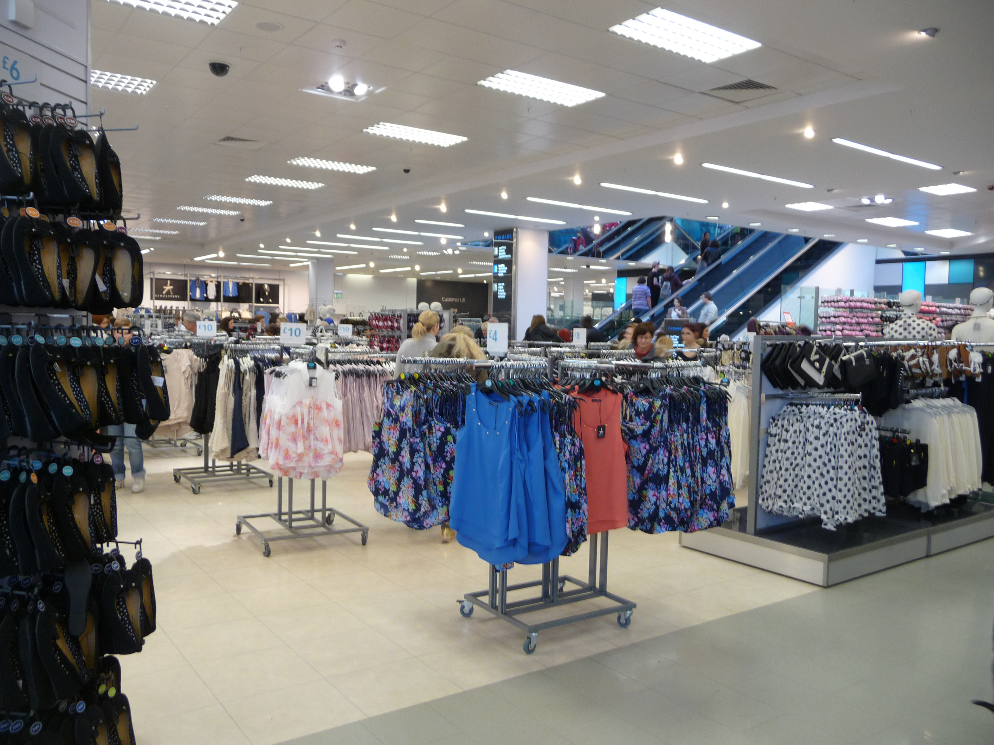 Primark (Londýn)